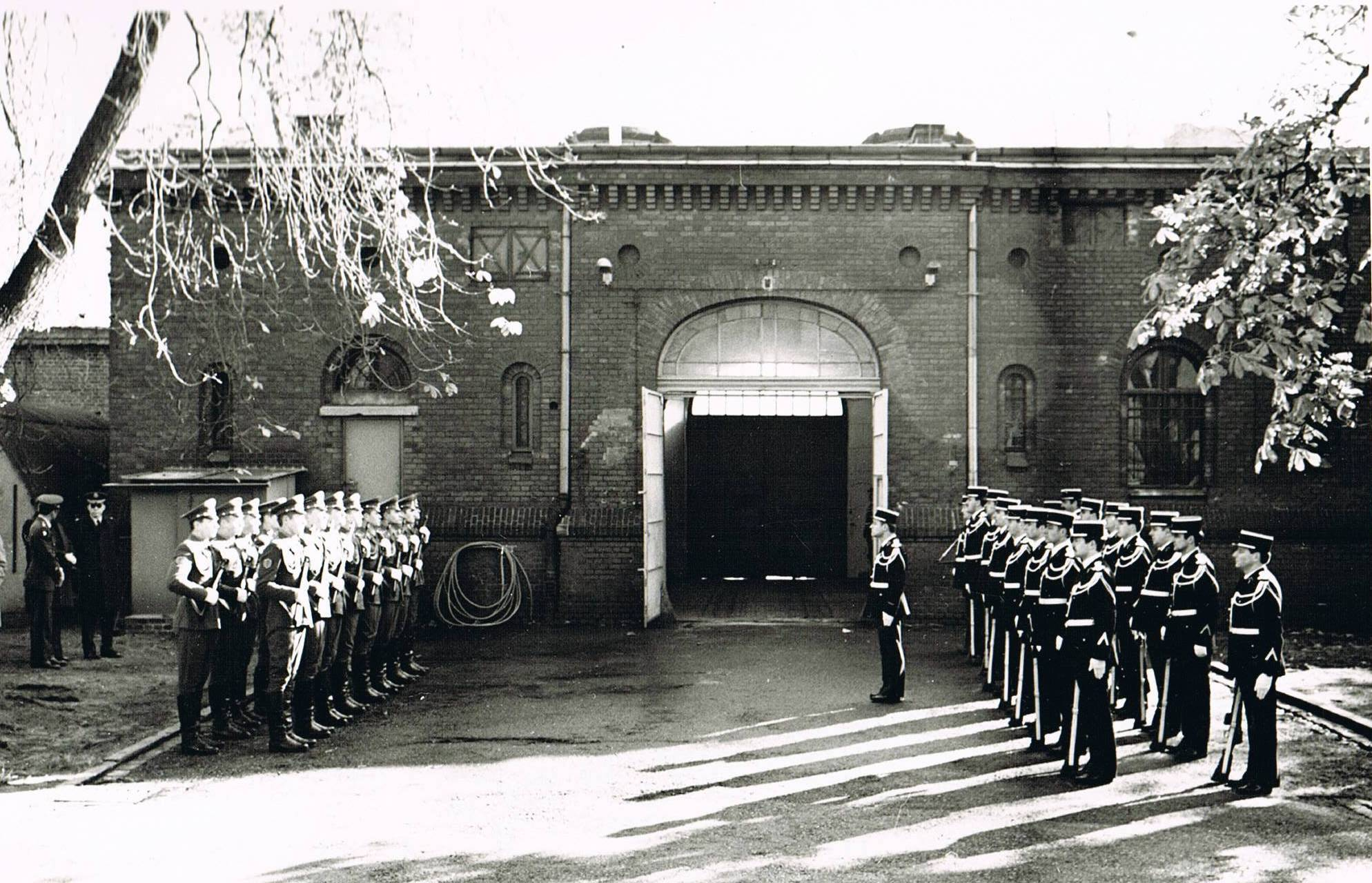 Wachwechsel der Streitkräfte Frankreichs und der UdSSR im Kriegsverbrechergefängnis Spandau am 1. März 1981.